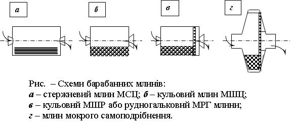 Млини: Схема